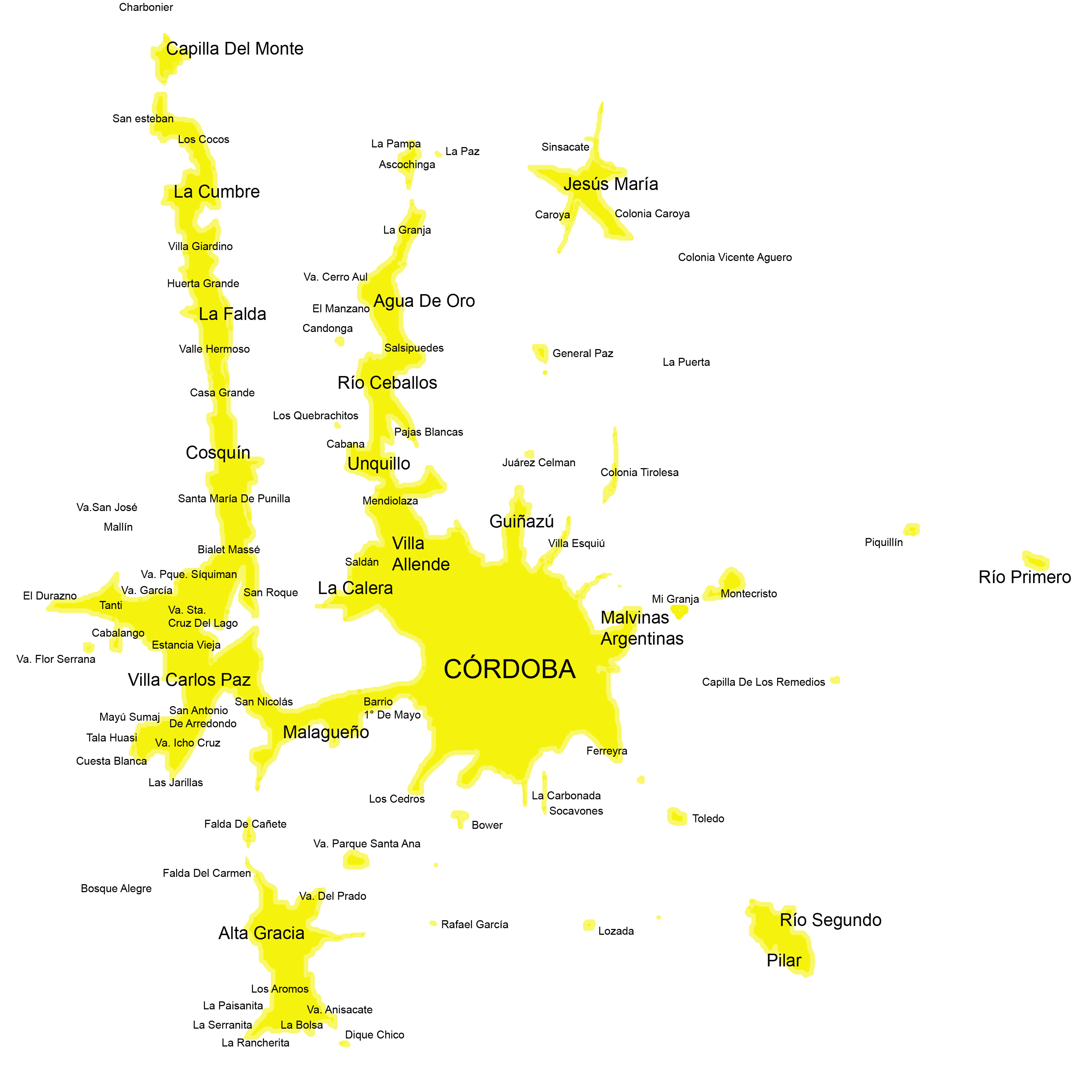 Localidades metropolitanas.